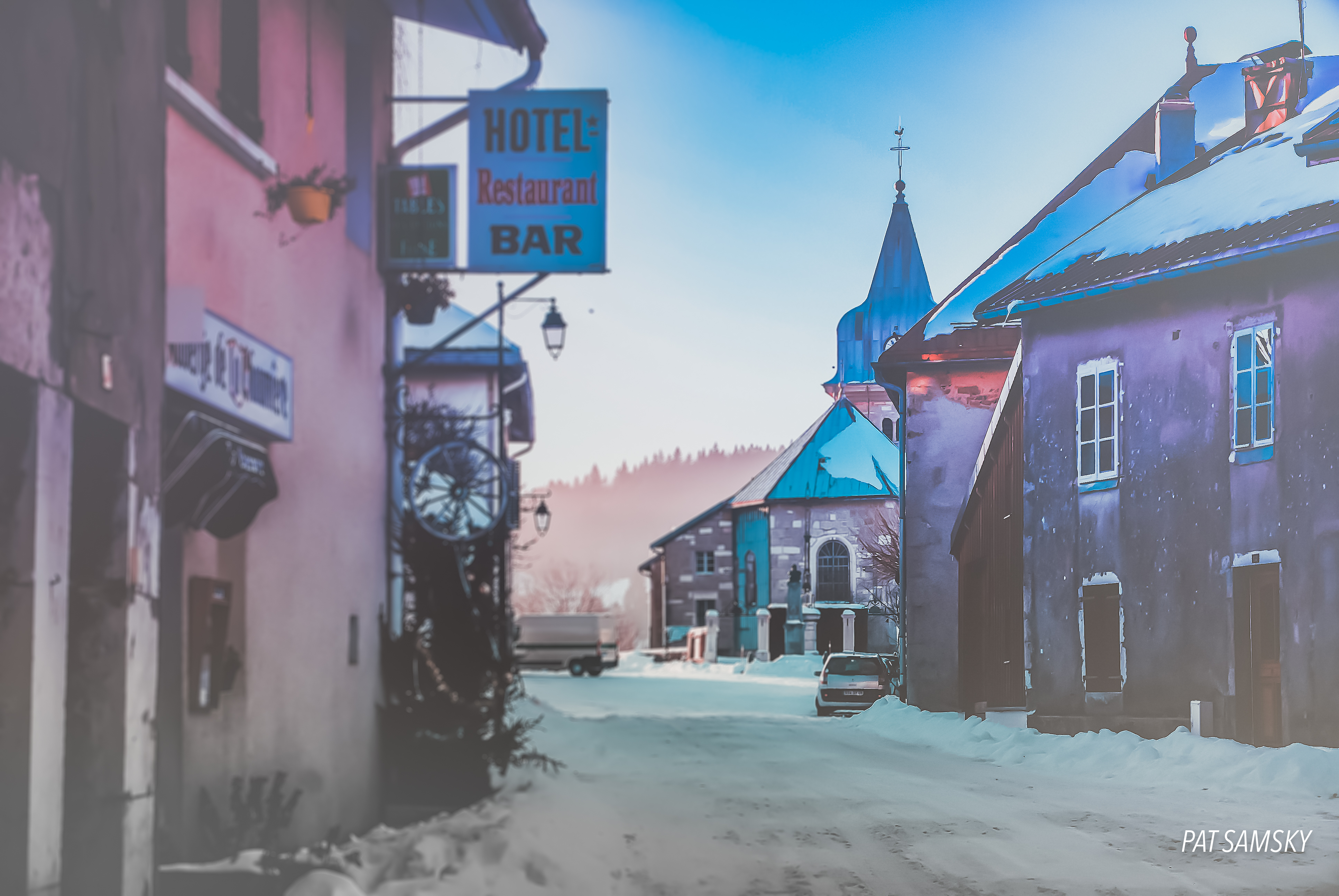 Les Bouchoux